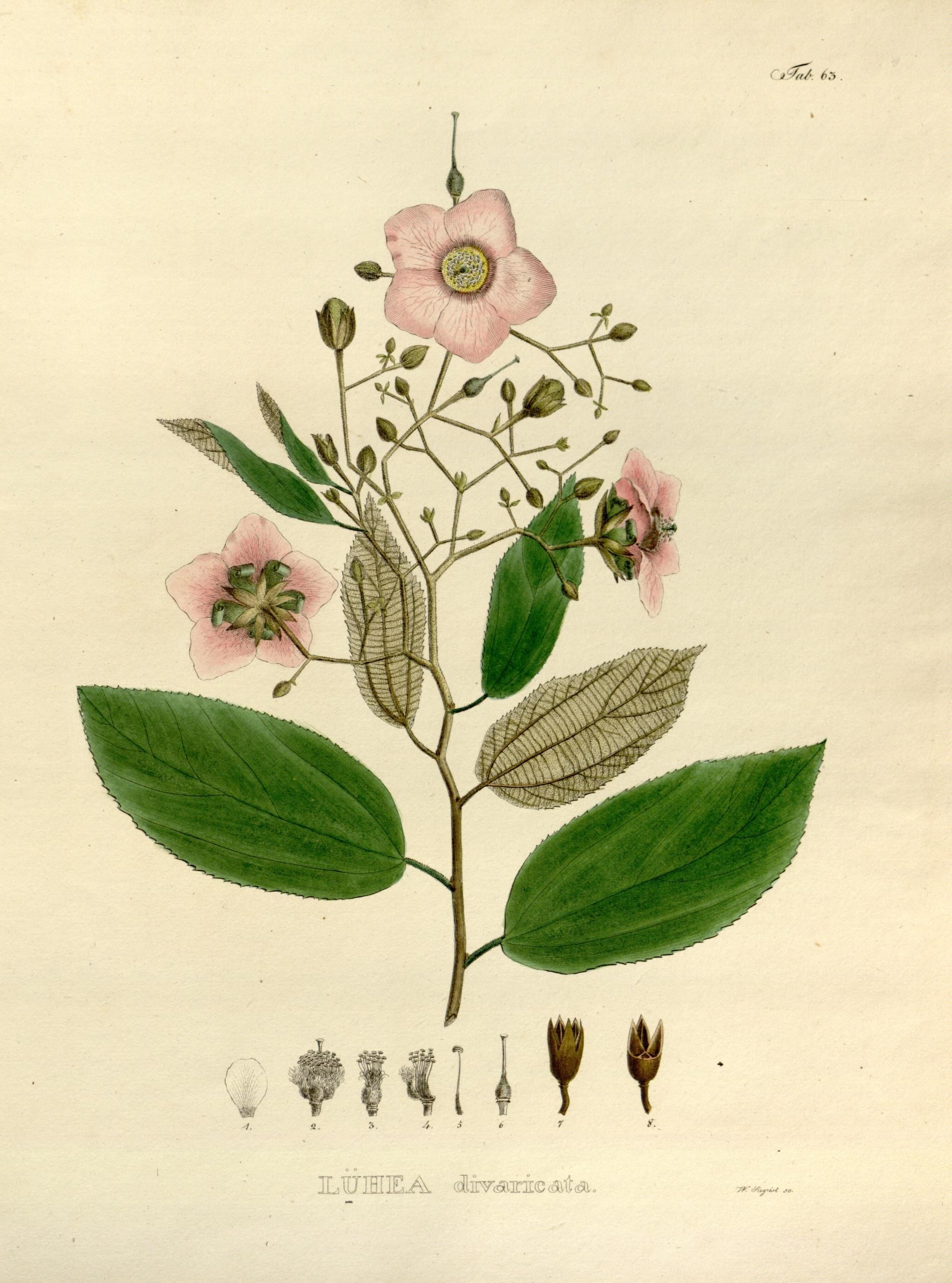 Luhea divaricata = Luehea divaricata Nova genera et species plantarum. Monachii [Munich] :Impensis Auctoris,1824-1829 [i.e. 1824-32]..